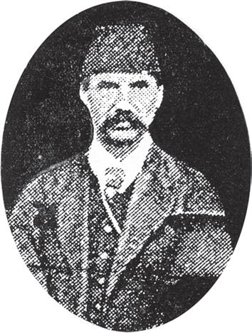 Георги Гогов (1821 - 1876).